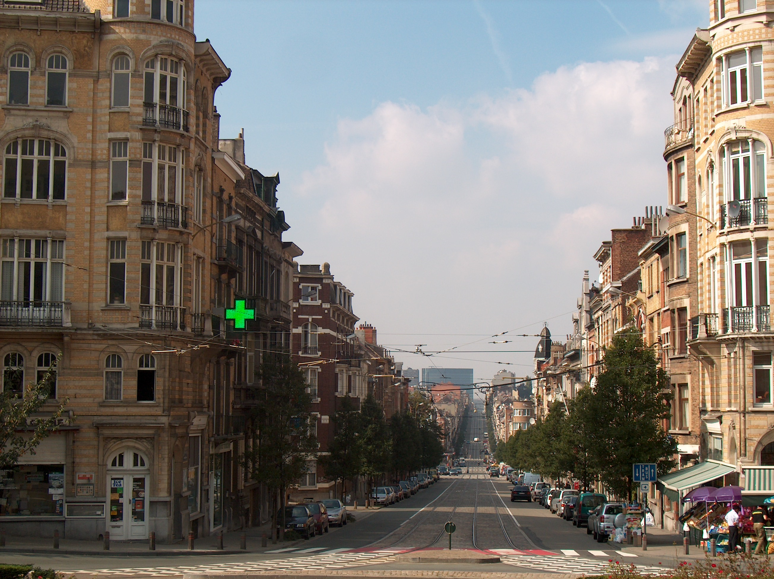 Bruxelles, Schaerbeek, avenue Rogier